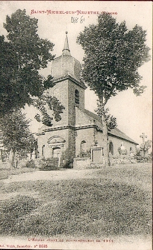 Saint Michel Sur Meurthe_Vosges_France